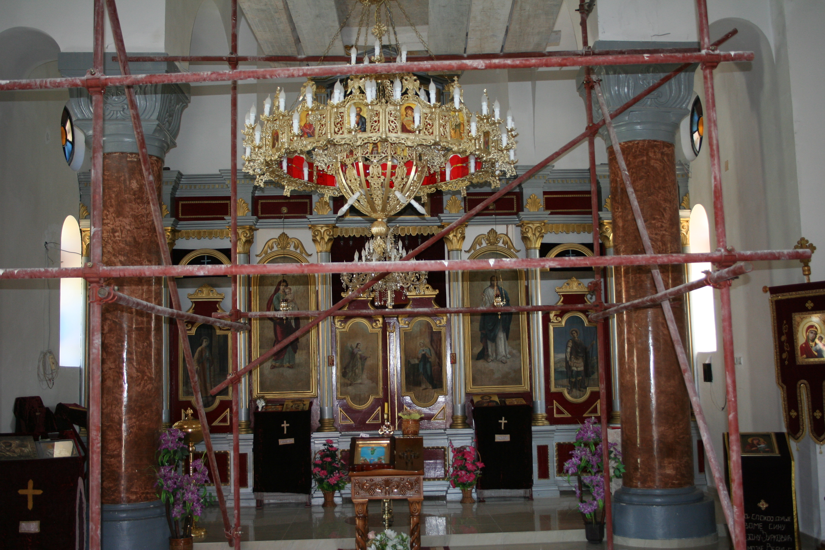 Crkva-spomen kosturnica Vaznesenja Gospodnjeg, Dublje